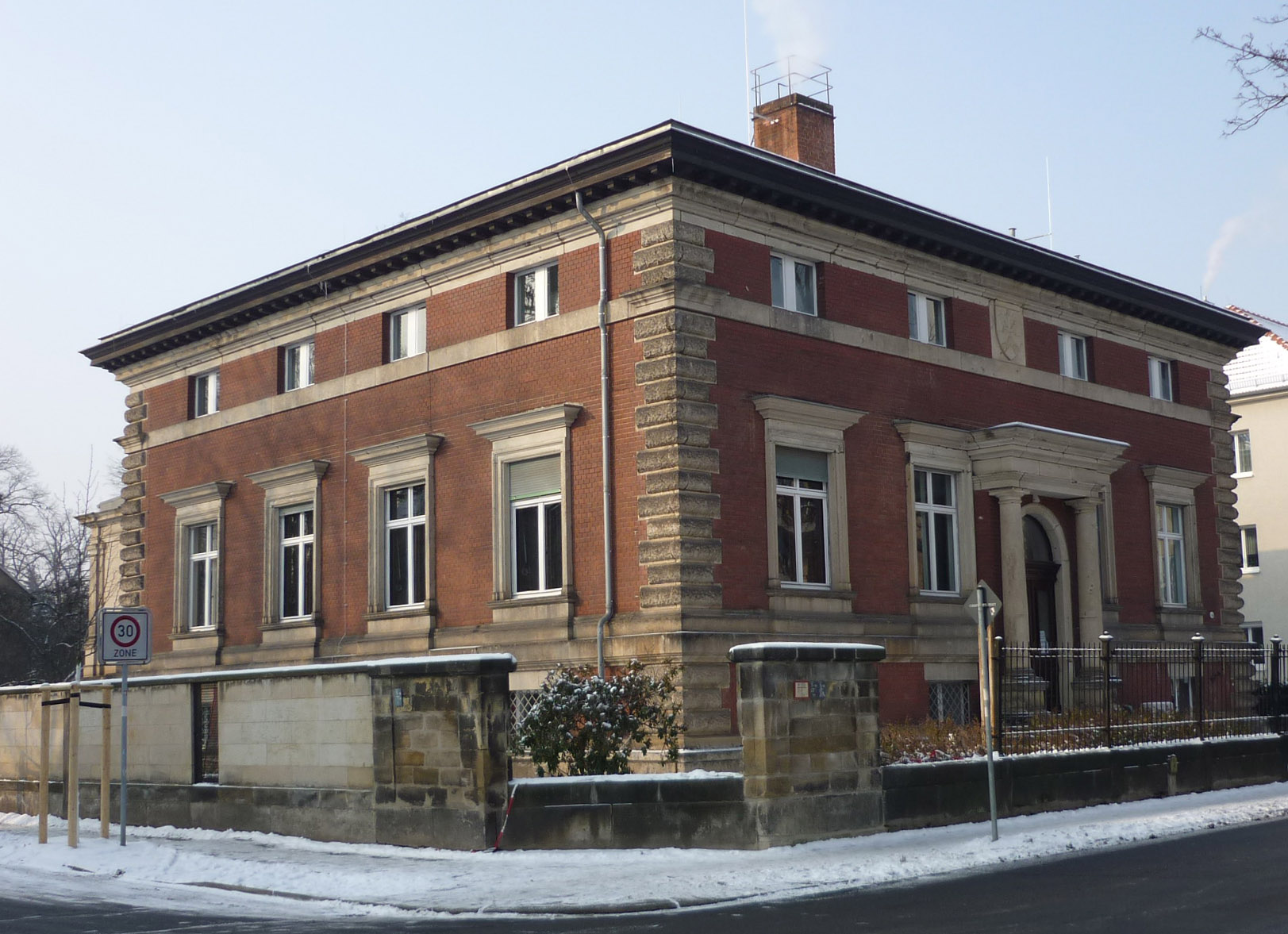 Bienert-Villa auf der Würzburger Straße 46 in Dresden-Plauen, z. Z. cfaed-Verwaltungssitz (cfaed - Center for Advancing Electronics Dresden).